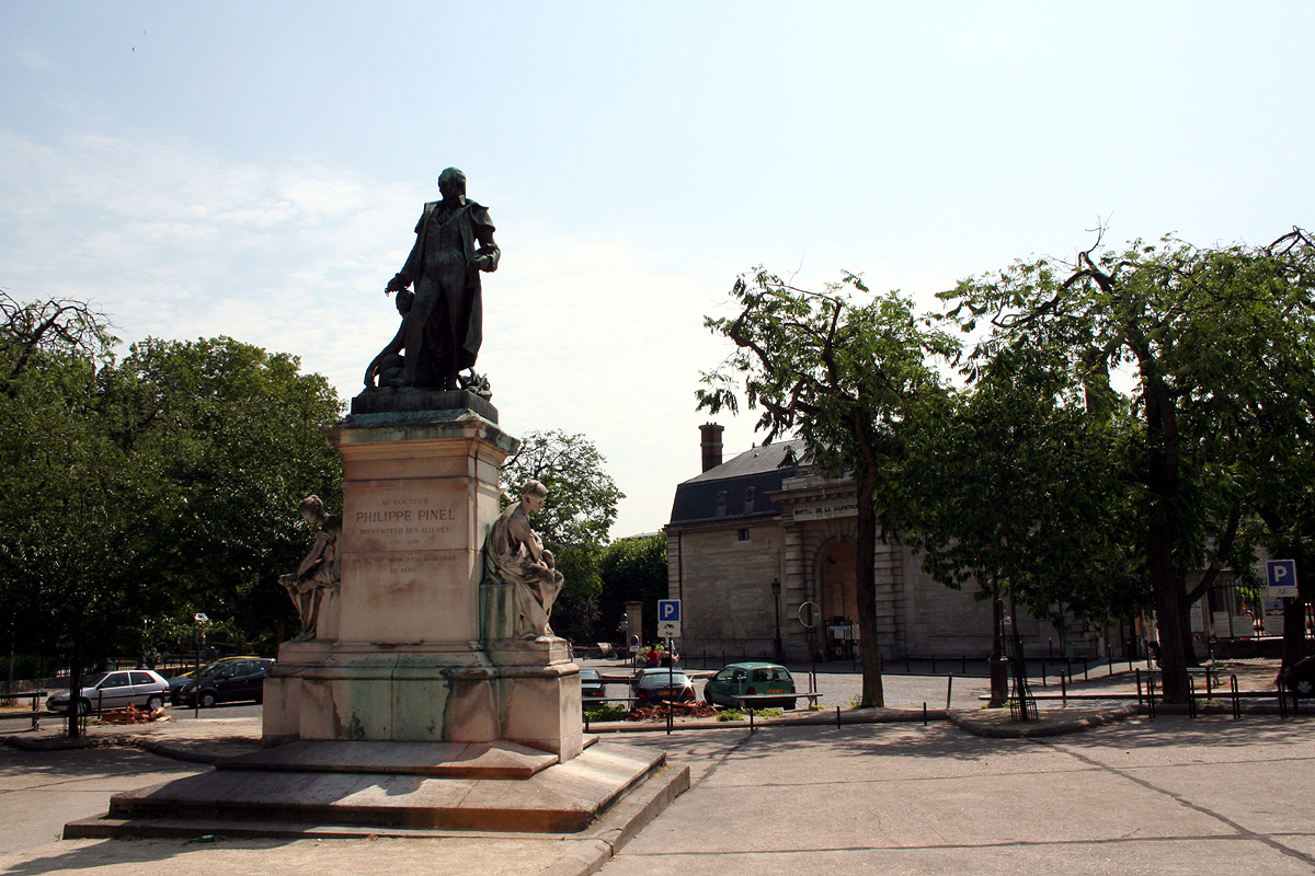 Monument to Philippe Pinel, in front of La Pitié Salpètrière, Paris, France